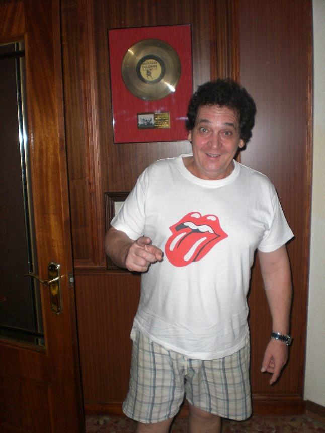 Toño Martin en su casa delante de uno de sus discos de Oro.